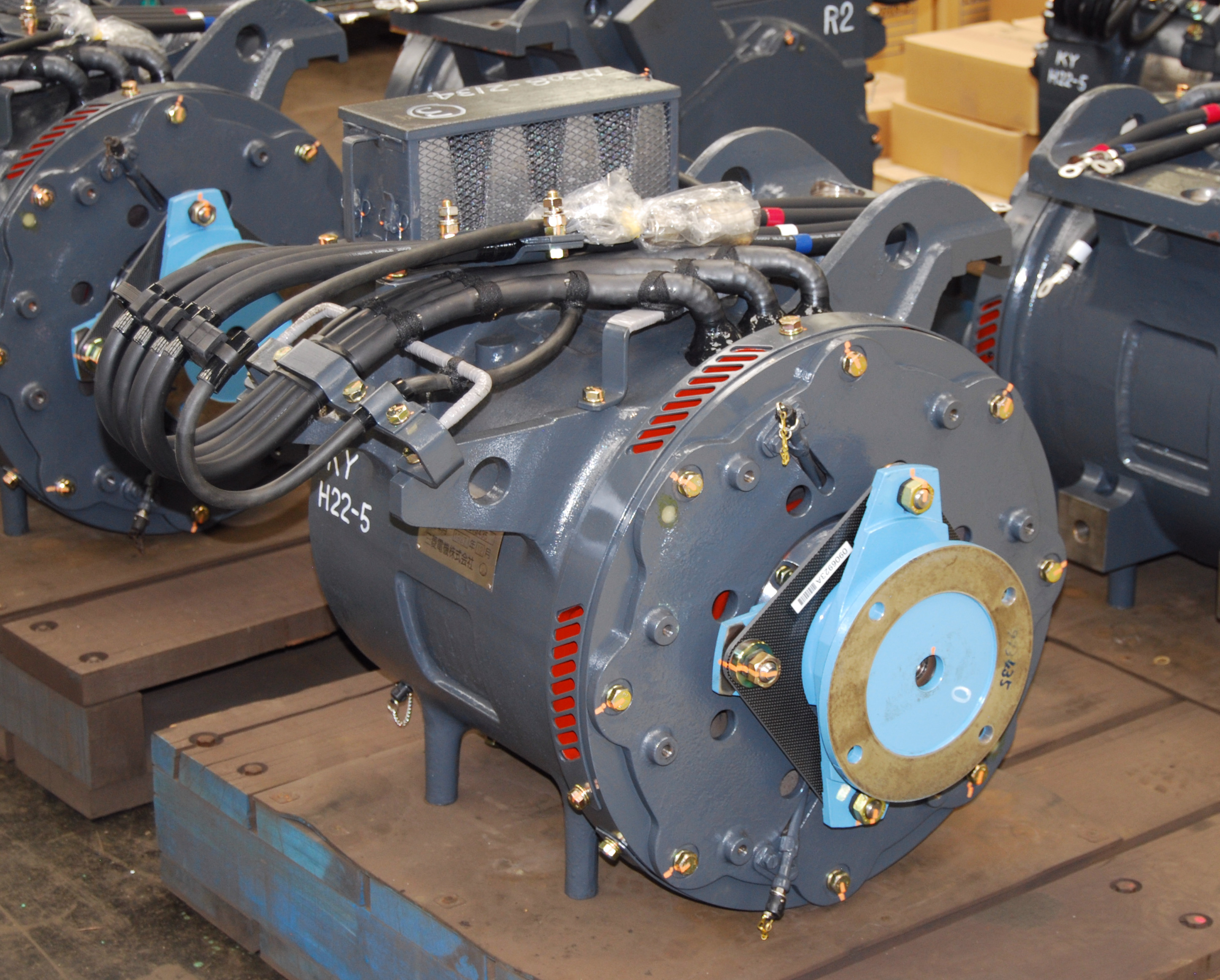 TD継手の付いたモーター（おおみやふれあい鉄道フェアーの工場開放にて撮影）